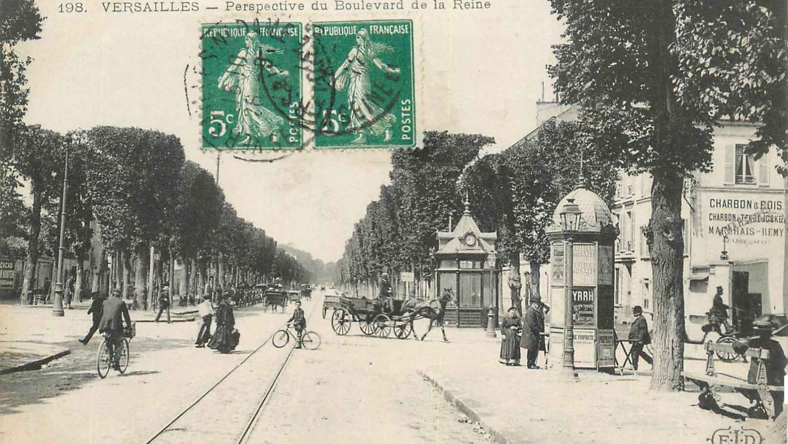 Carte postale du début du XXe siècle avec en photo le boulevard de la Reine à Versailles.